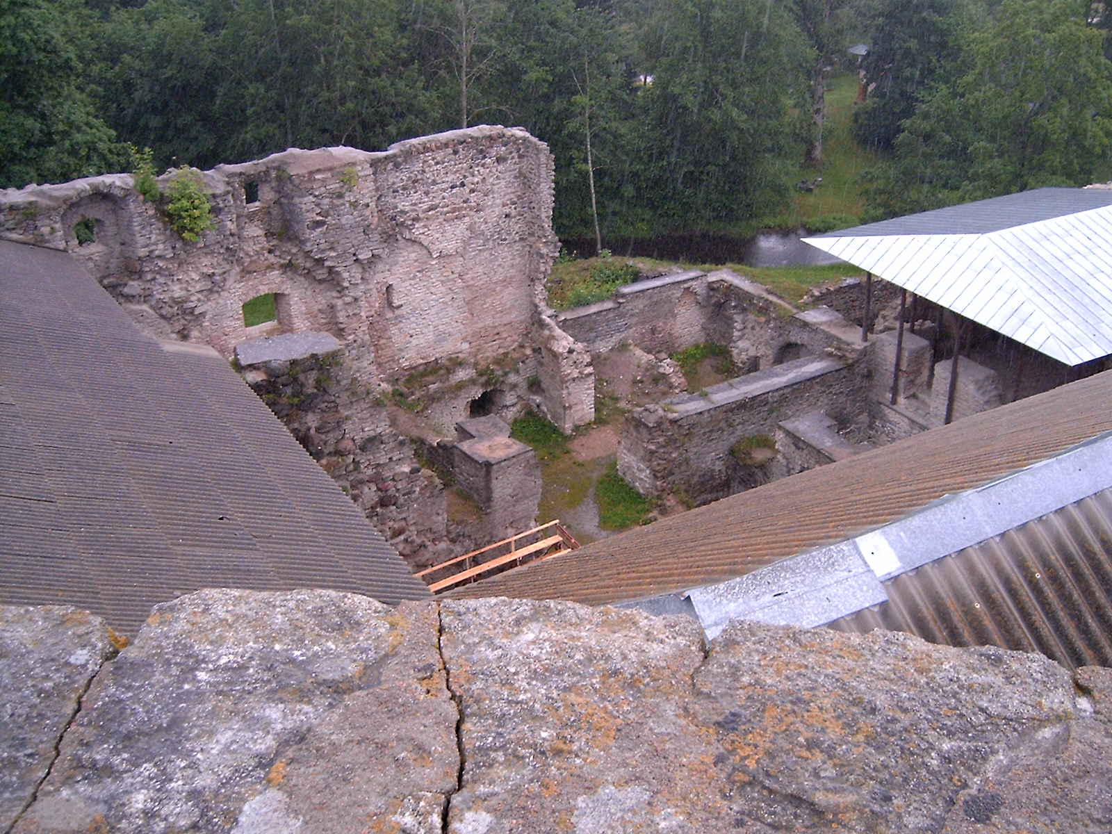 Padise klooster in Estonia